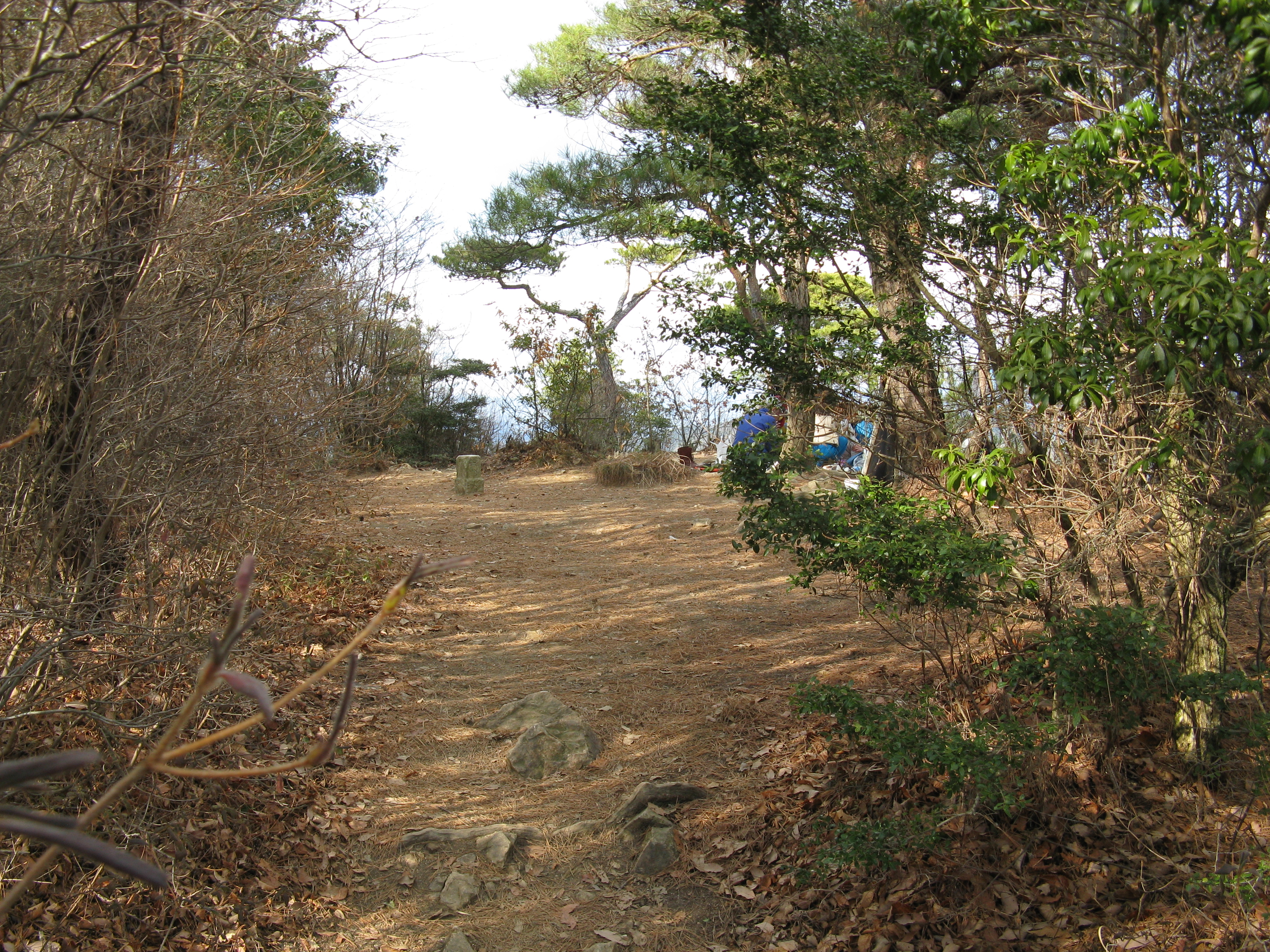 中山 (兵庫県)の山頂